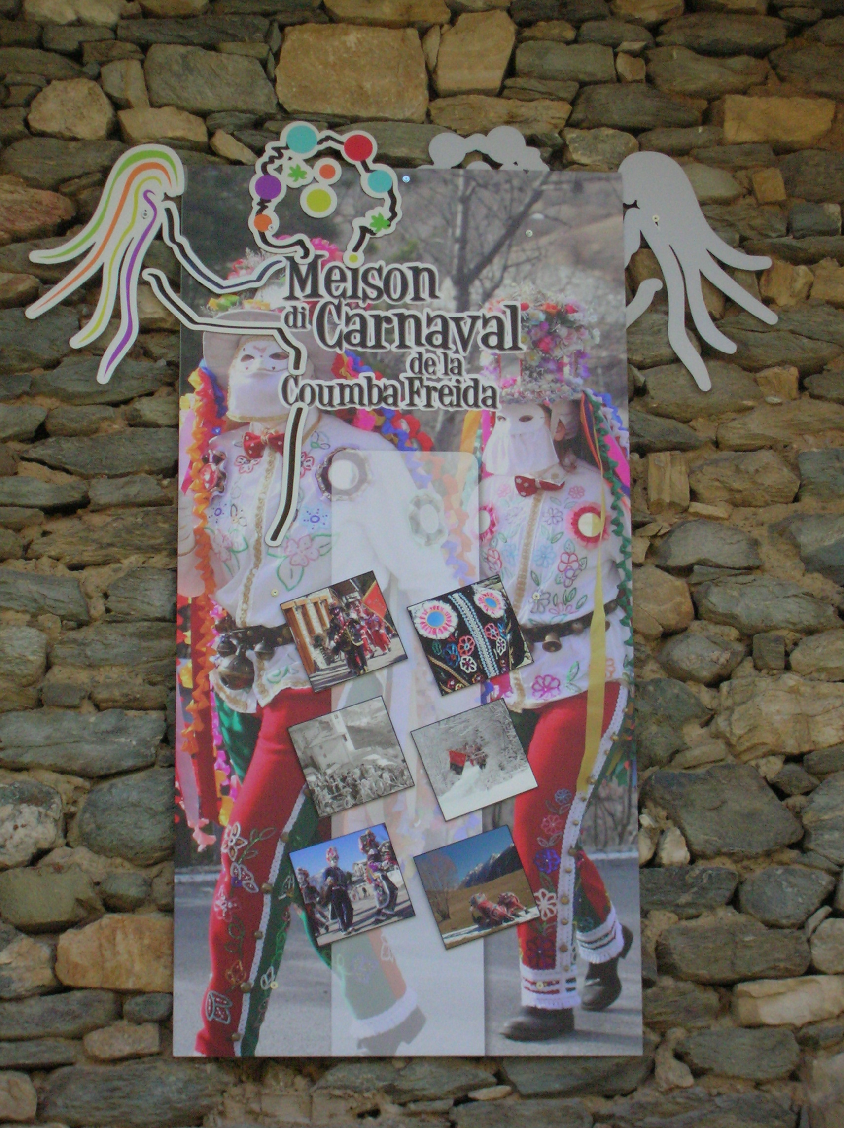 Casa medievale di Ayez, Allein, Valle d'Aosta, Italia.